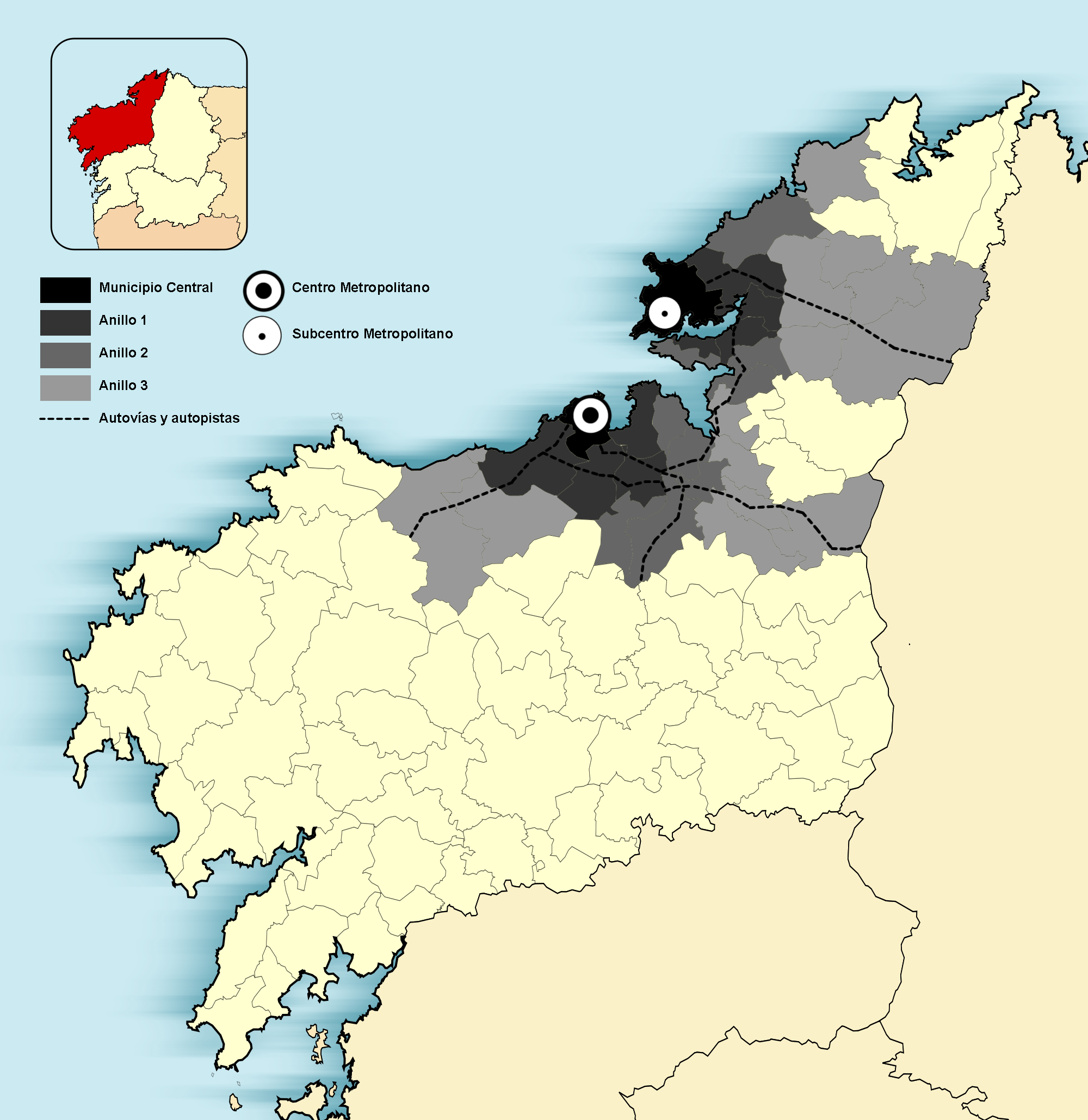 Región urbana funcional de Artabria